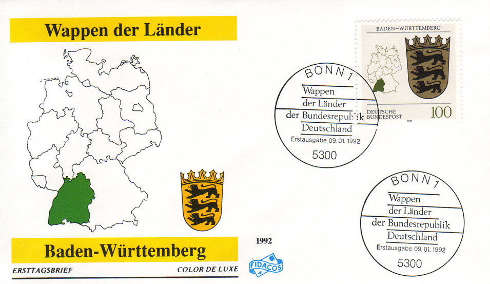 Serie: Wappen der Länder der BRD, Ersttagsbrief